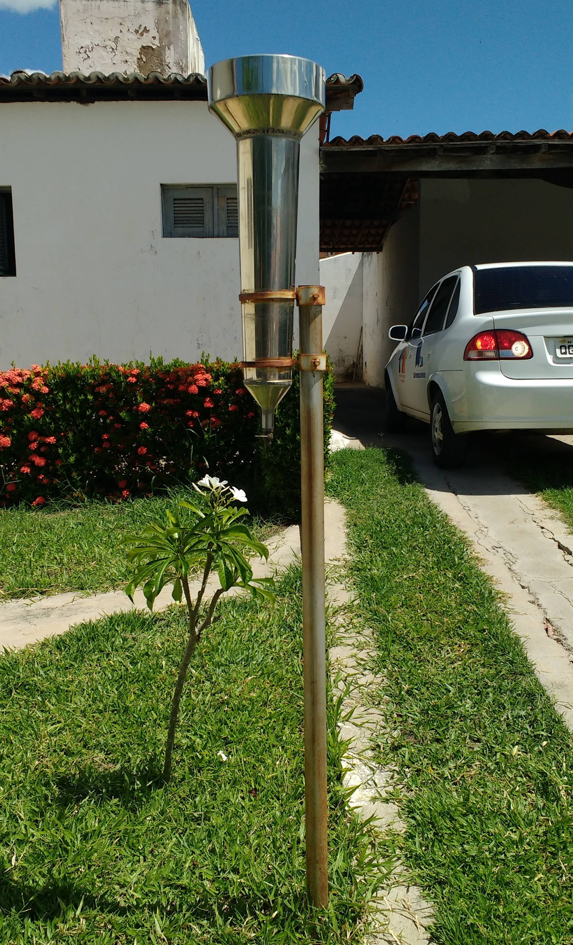 Pluviômetro Ville-de-Paris monitorado pela Empresa de Pesquisa Agropecuária do Rio Grande do Norte (EMPARN) no centro de saúde de São Francisco do Oeste, Brasil